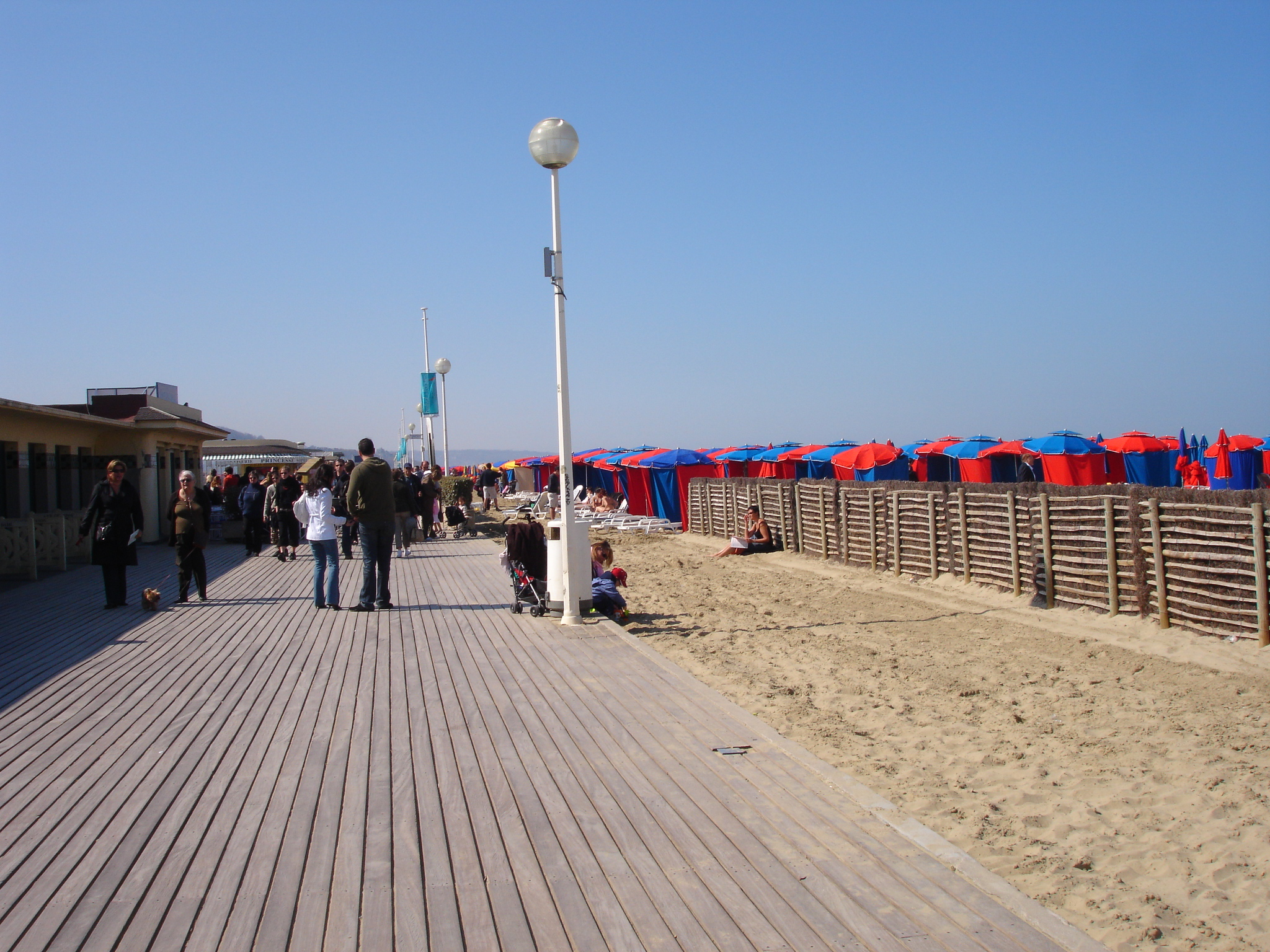 France, Calvados (14) , Deauville, plage